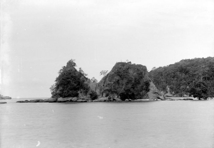 Repronegatief. De haven van Leksoela, Boeroe